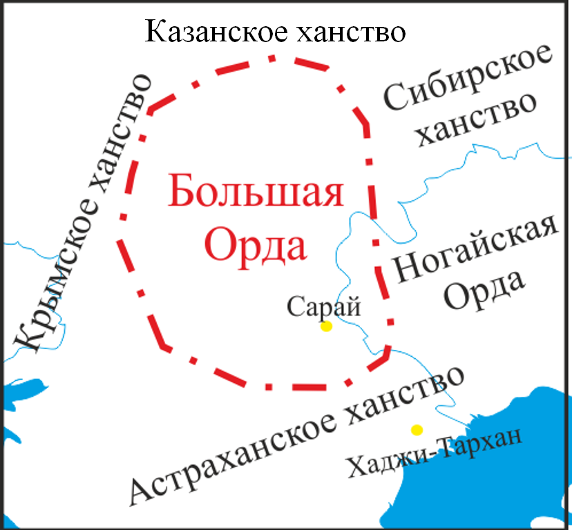 Карта Большой Орды